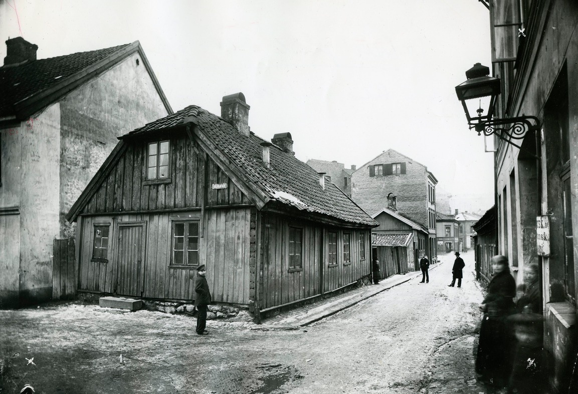 Bakkegaten går mot høyre og Skolegaten mot venstre på dette bildet fra ca. 1900. Foto: Ukjent/Arbeiderbevegelsens arkiv og bibliotek.